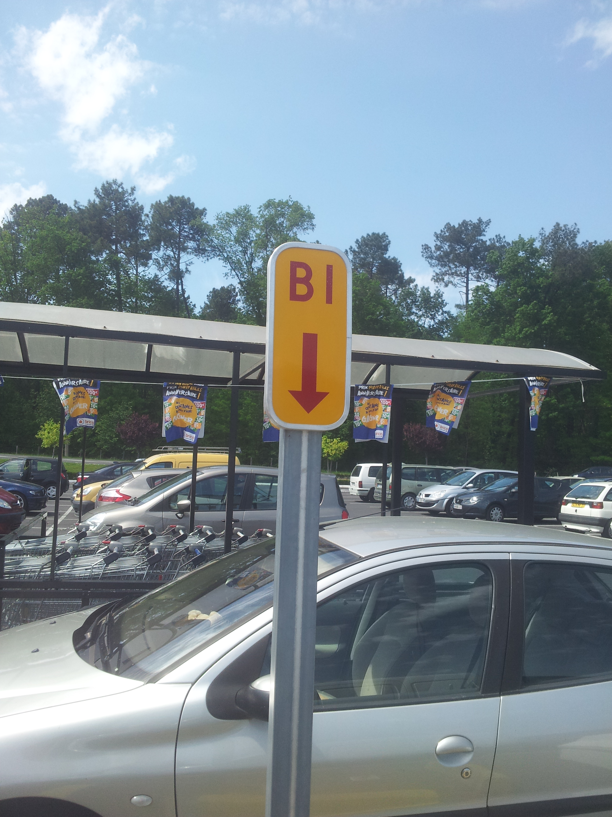 Panneau BI pour marquer l'emplacement d'une bouche incendie.